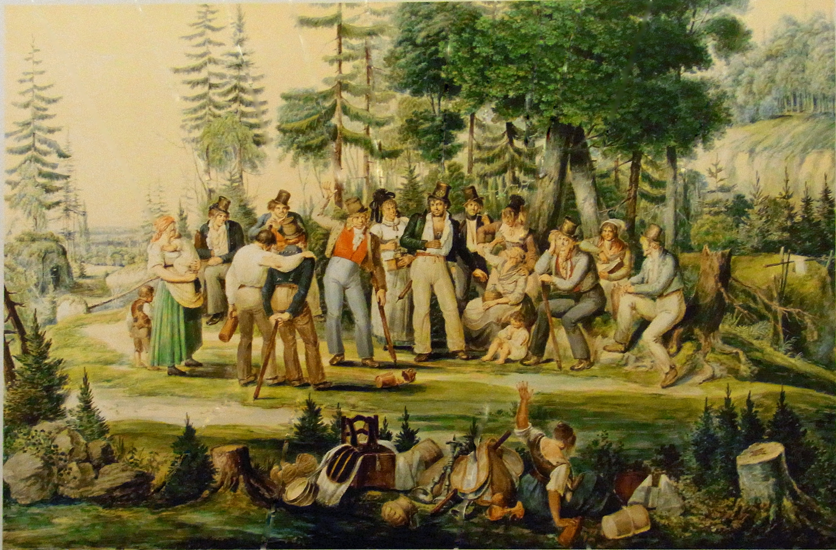 Die Räuberbande des Schwarzen Veri von links: Ottilia Hunsinger "Vetterls Ottil", Franz Merkle "Weberfranz", Josef Anton Jung "Condeer" vorn, Sebastian Kellermann "Baste", Fidelis Sohm "Einäugiger Fidele" vorn, Friedrich Klumpp "Schöner Fritz", Josepha Tochtermann "Günzburger Sephe", Xaver Hohenleiter "Schwarzer Veri", Ulrich Hohenleiter "Urle", Agathe Gebhard "Schwarze Agath", Katharina Gebhard "Dreckete Mutter" oder "Alte Gebhartin", Kind vom "Schwarzen Veri", Fidelis Gindele "Roter Metzger", Agnes oder Creszentia Gebhard vorn, unbekannte Frau, Christian Maucher "Bometshauser Schneider" (Susanne Mück und Ute Beitler: Ausgeraubt & abgemurkst. Aus der wilden Räuberzeit um 1800. Haus am Neppomuk, Rottenburg am Neckar 2010, ISBN 978-3-941981-02-7., S. 60)